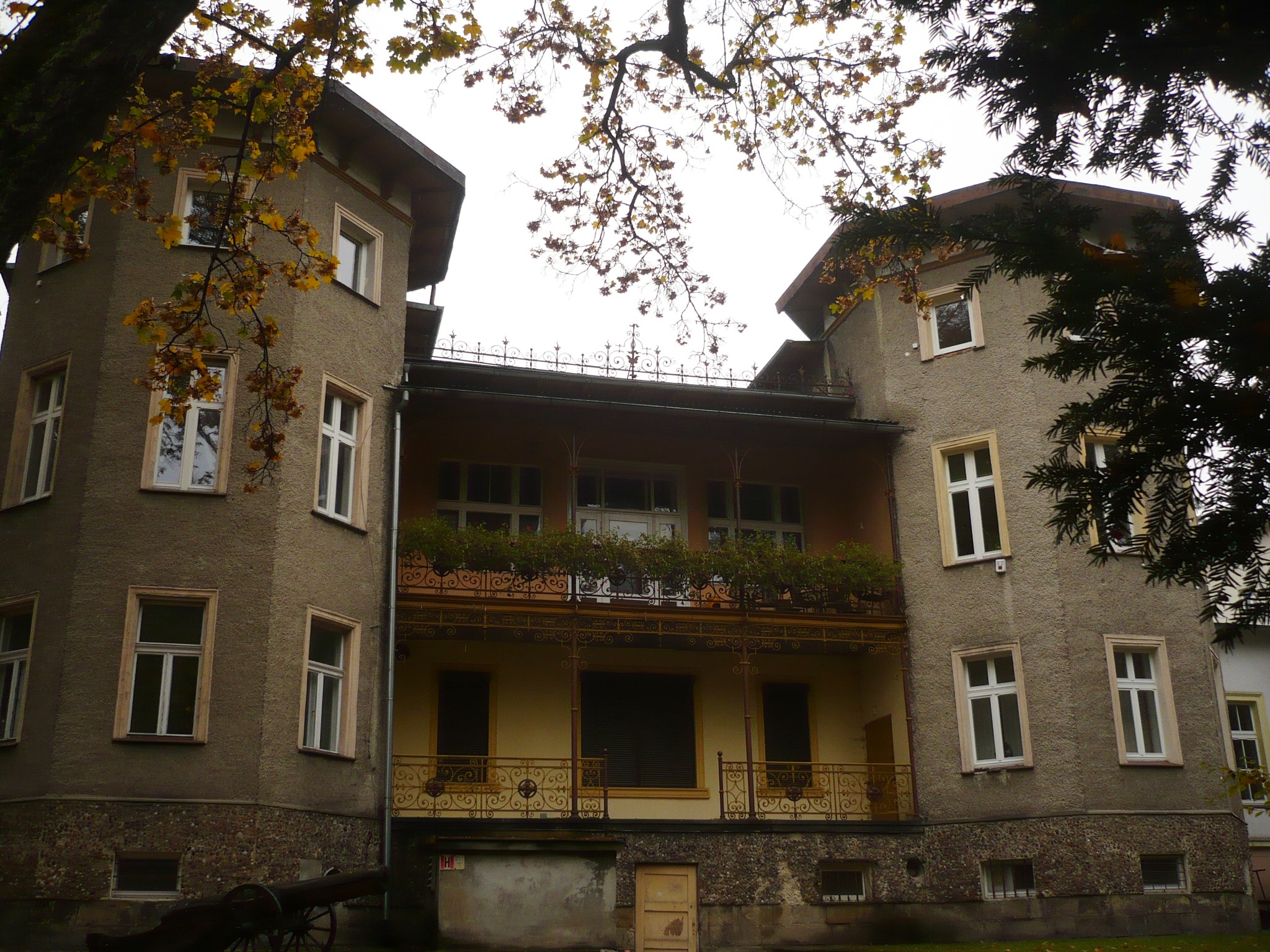 Sokołowsko Park Zdrojowy, ul. Parkowa - zespół dawnego sanatorium dr. T. Römplera, obecnie sanatorium "Biały Orzeł"